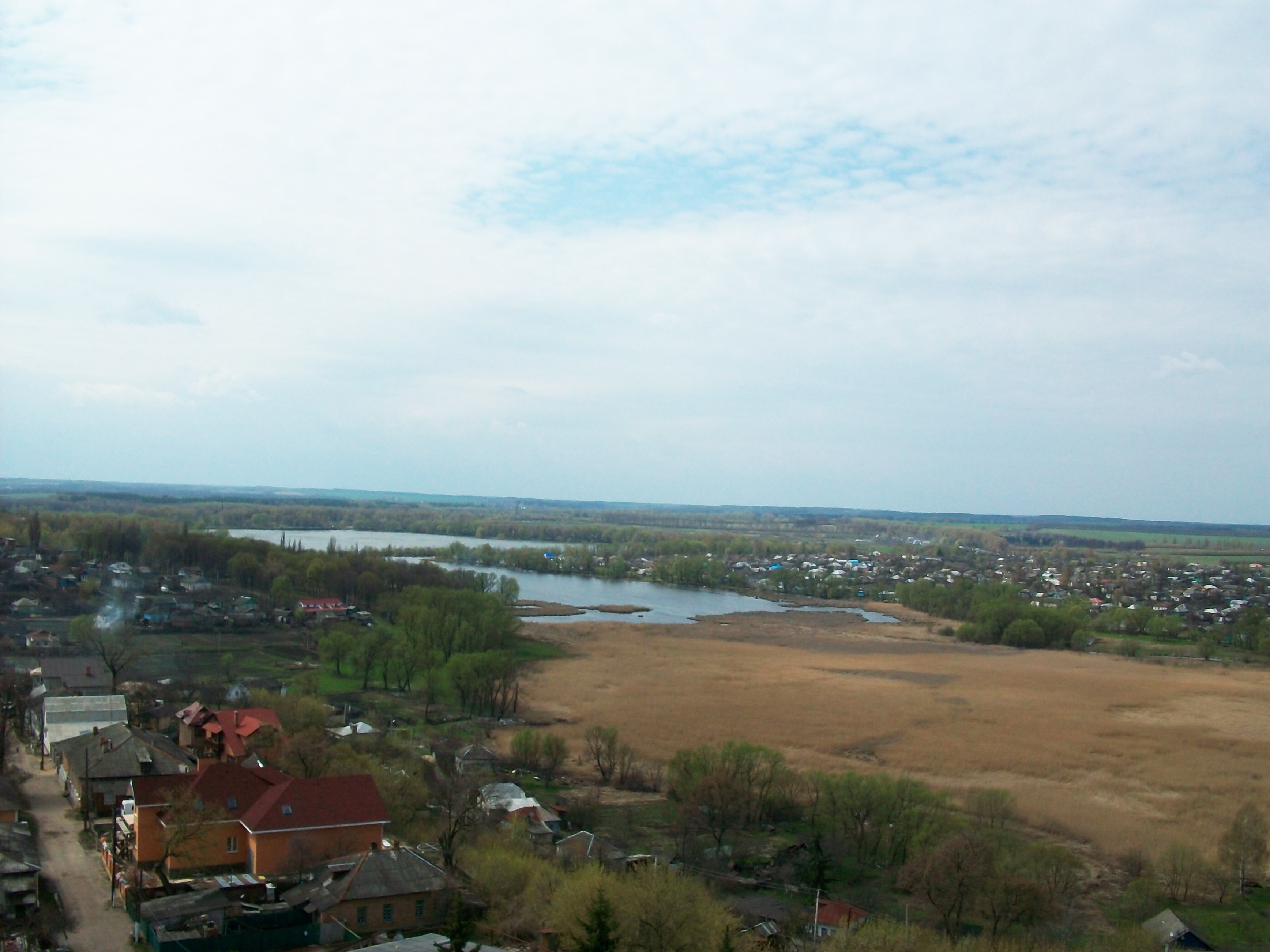 Пейзаж